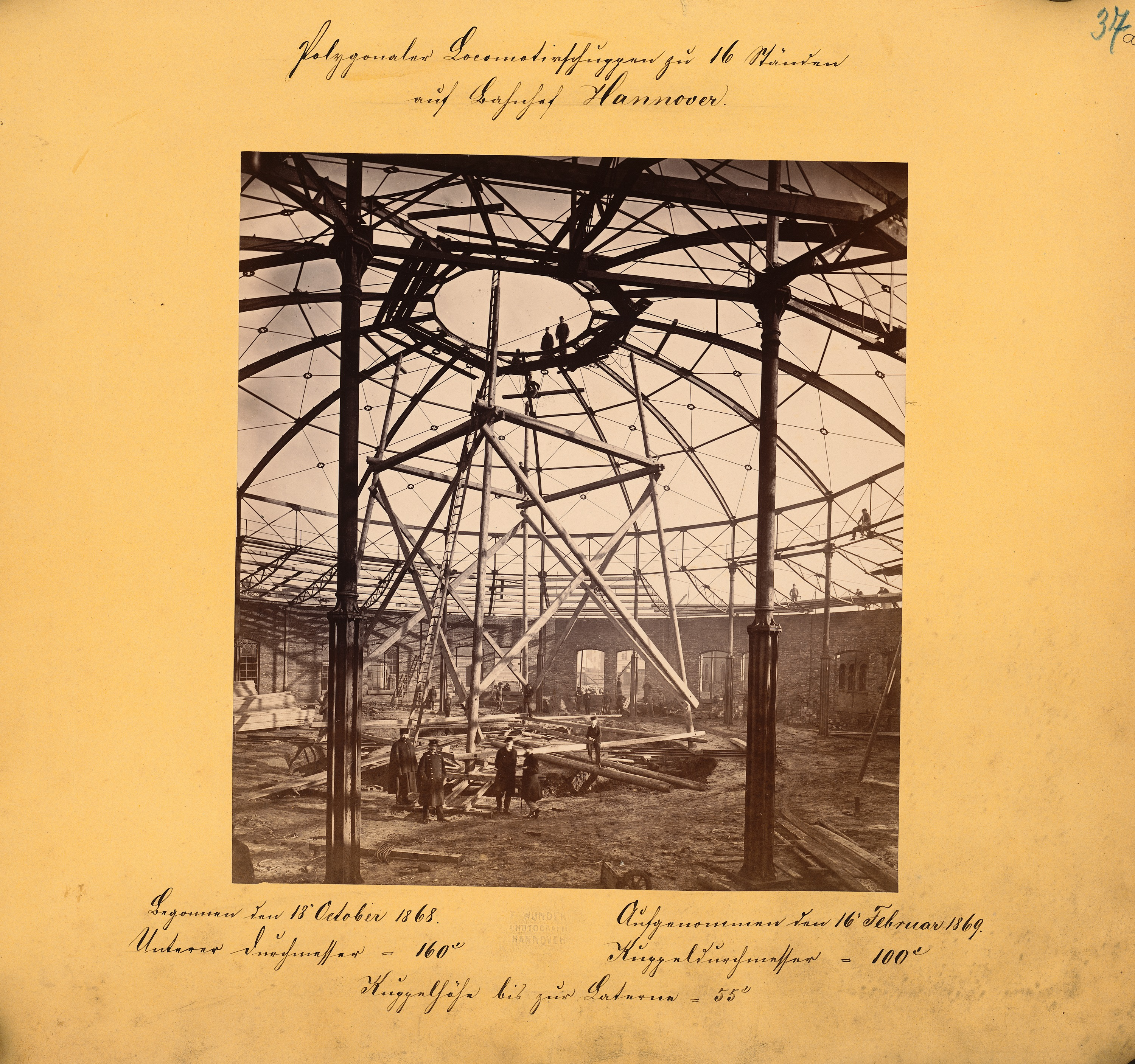 N.N. , Lokomotivschuppen, Hannover: Innenansicht während der Bauarbeiten. Foto auf Karton, 22,90 x 20,80 cm (inkl. Scanrand). Architekturmuseum der Technischen Universität Berlin Inv. Nr. BZ-F 01,037,2.